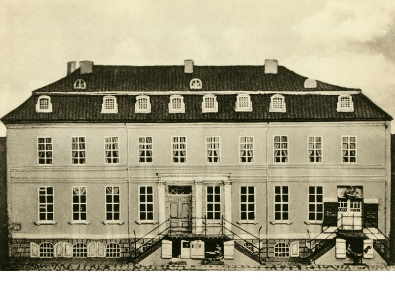 Altes Löbenichtsches Rathaus in Königsberg